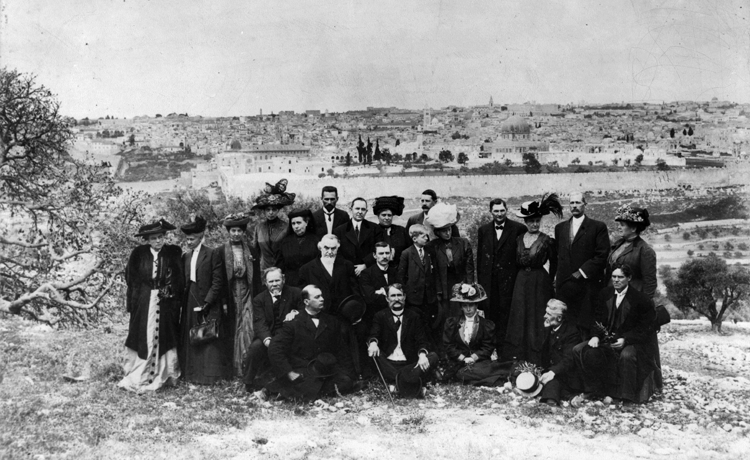 C.T. Russell i J.F. Rutherford na Górze Oliwnej (widok na Jerozolimę) - 21-24 kwietnia 1910